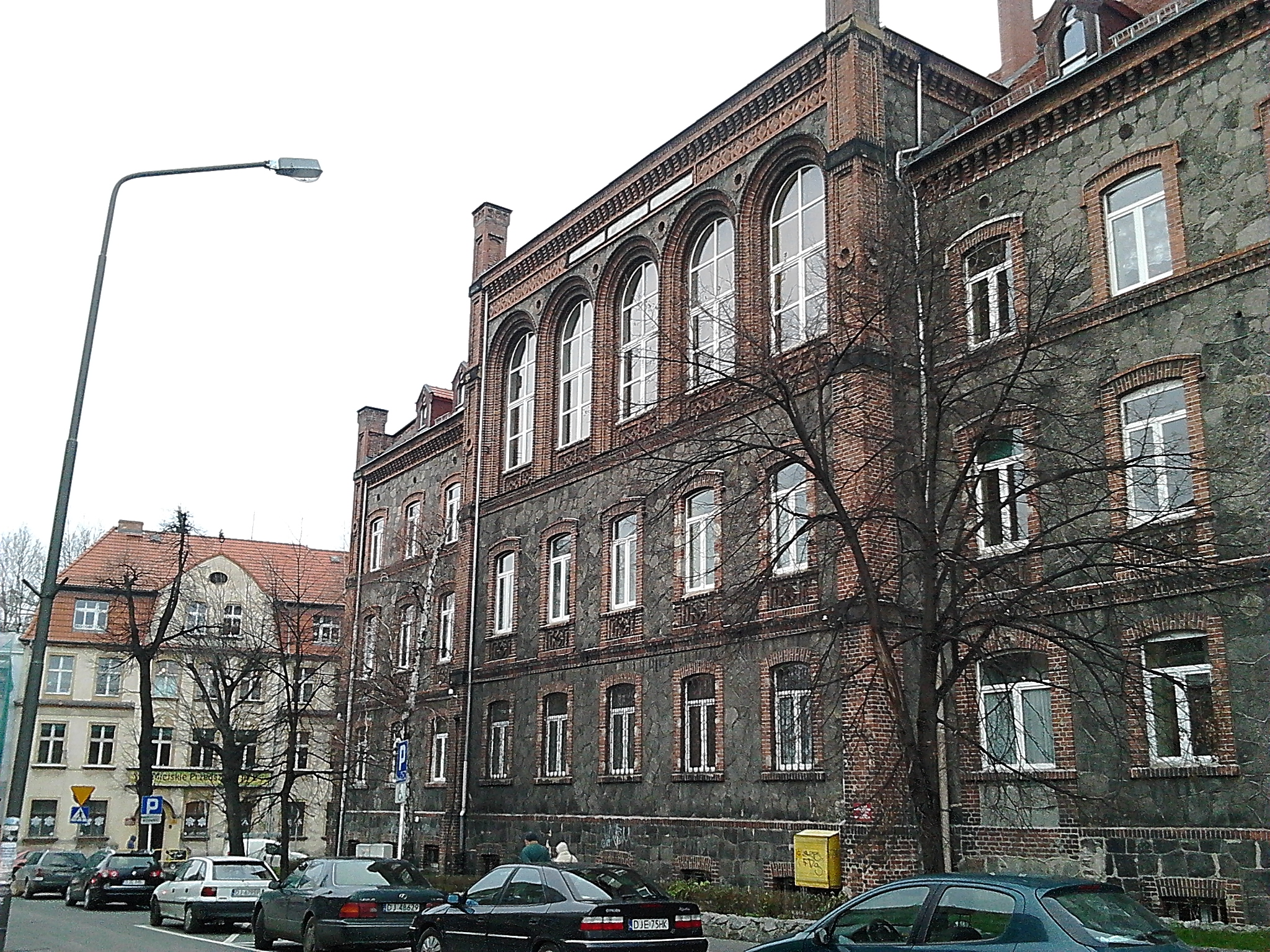 Zespół Szkół Ekonomiczno-Turystycznych w Jeleniej Górze, ul. Piłsudskiego 27